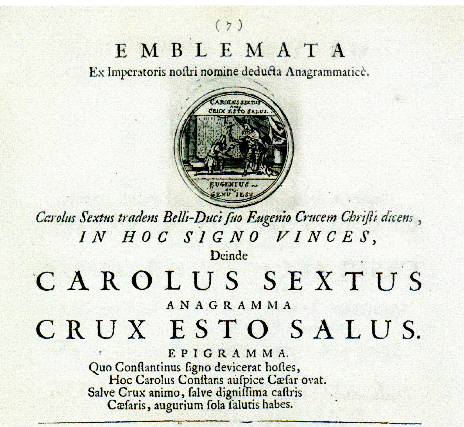 Extrait de la page 7. du livre de Petrus Vander Borcht, Applausus chronographicus, Bruxellis, apud Josephum t'Serstevens, 1717, pagina 7. EPIGRAMMA: Quo Constantinus signo devicerat hostes, Hoc Carolus Constans auspice Caesar ovat.